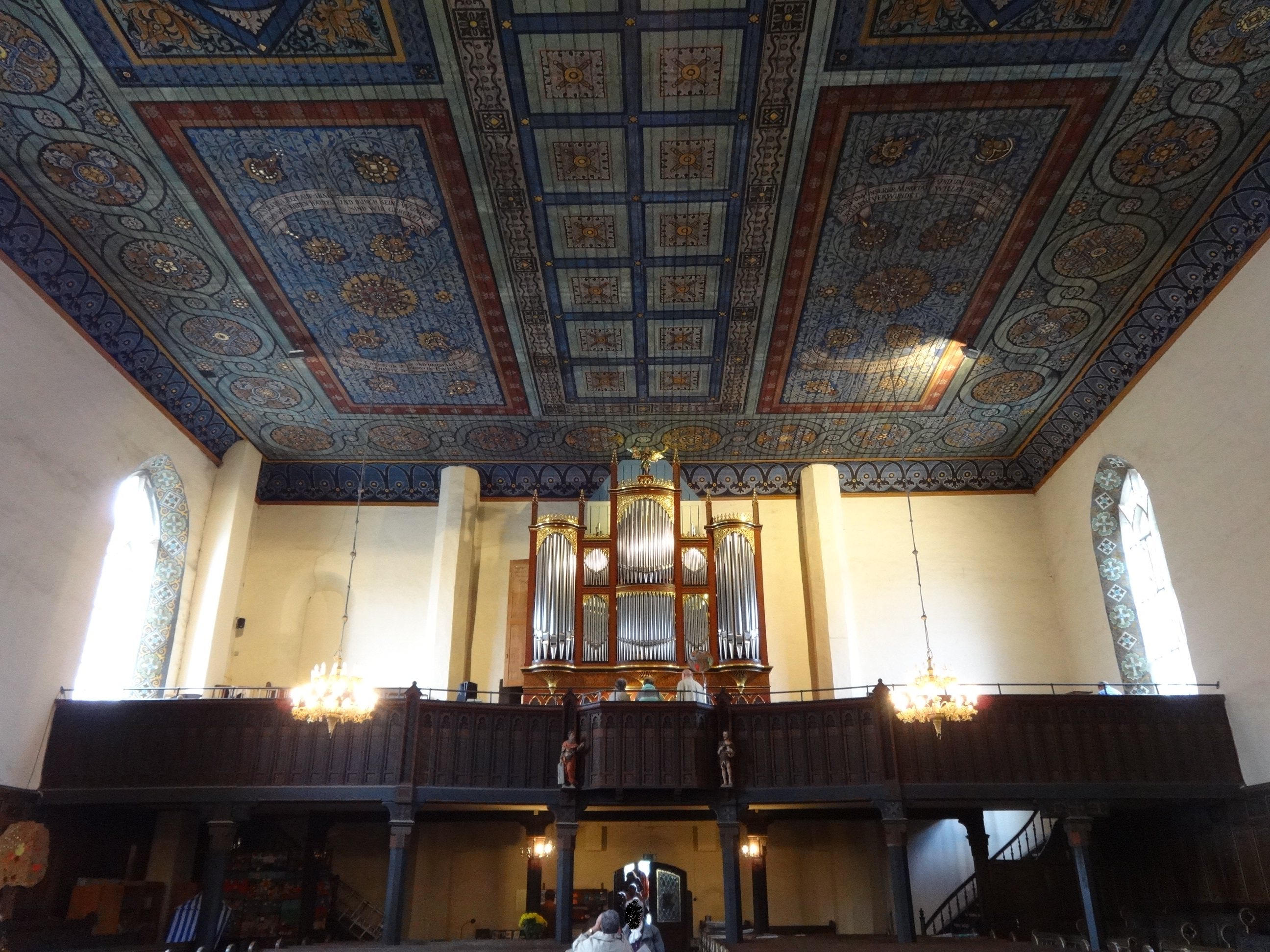 Die Stadtpfarrkirche St. Nikolai in Bad Liebenwerda ist ein spätgotisches Bauwerk, dessen genaues Baudatum unbekannt ist. Nach einem Brand setzte sich Friedrich III. (Sachsen) dafür ein, sie im Jahr 1515 wieder aufzubauen. Aus den Jahren 1519 und 1544 sind Besuche Martin Luthers überliefert. Im Innern befinden sich eine neugotische Kanzel sowie eine prachtvolle Flachdecke, die August Oetken im Jahr 1911 gestaltete. Die Glasmalereien in den vier Fenstern des Chors zeigen die Taufe Jesu, Geburt, Kreuzung und Auferstehung Jesu Christi. Sie stammen aus dem Jahr 1908 und entstanden in der Werkstatt von Gerstner und Werner in Görlitz und gehen auf Stiftungen des Apothekers Liebe sowie dem Büromaschinenhersteller Reiss zurück. Sehenswert ist weiterhin eine Fünte aus Sandstein aus dem Jahr 1671. sowie ein überlebensgroßes Kruzifix vor einem Triumphkreuz an der Südwand, das vermutlich aus dem 16. oder 17. Jahrhundert stammt.